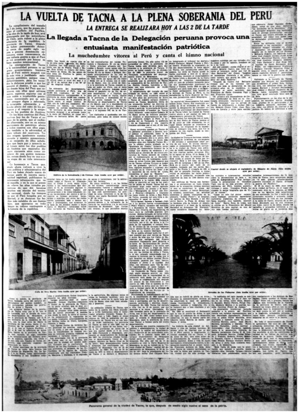 Diario sobre reincorporación de Tacna